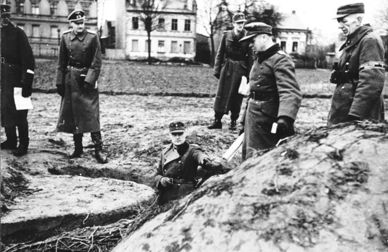 Kampf um Berlin: General Leutnant Reymann in einem M-G-Stand des Abschnitts B März 1945